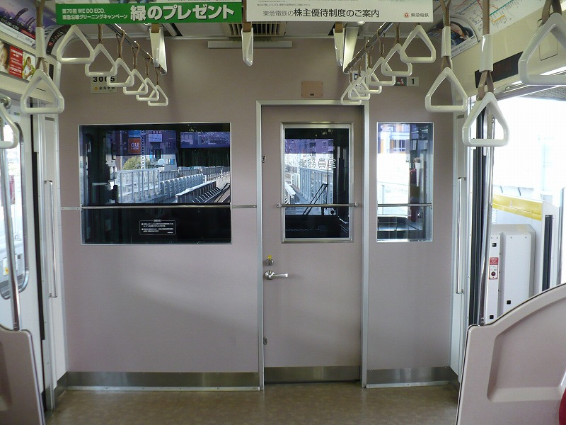 東急3000系の室内